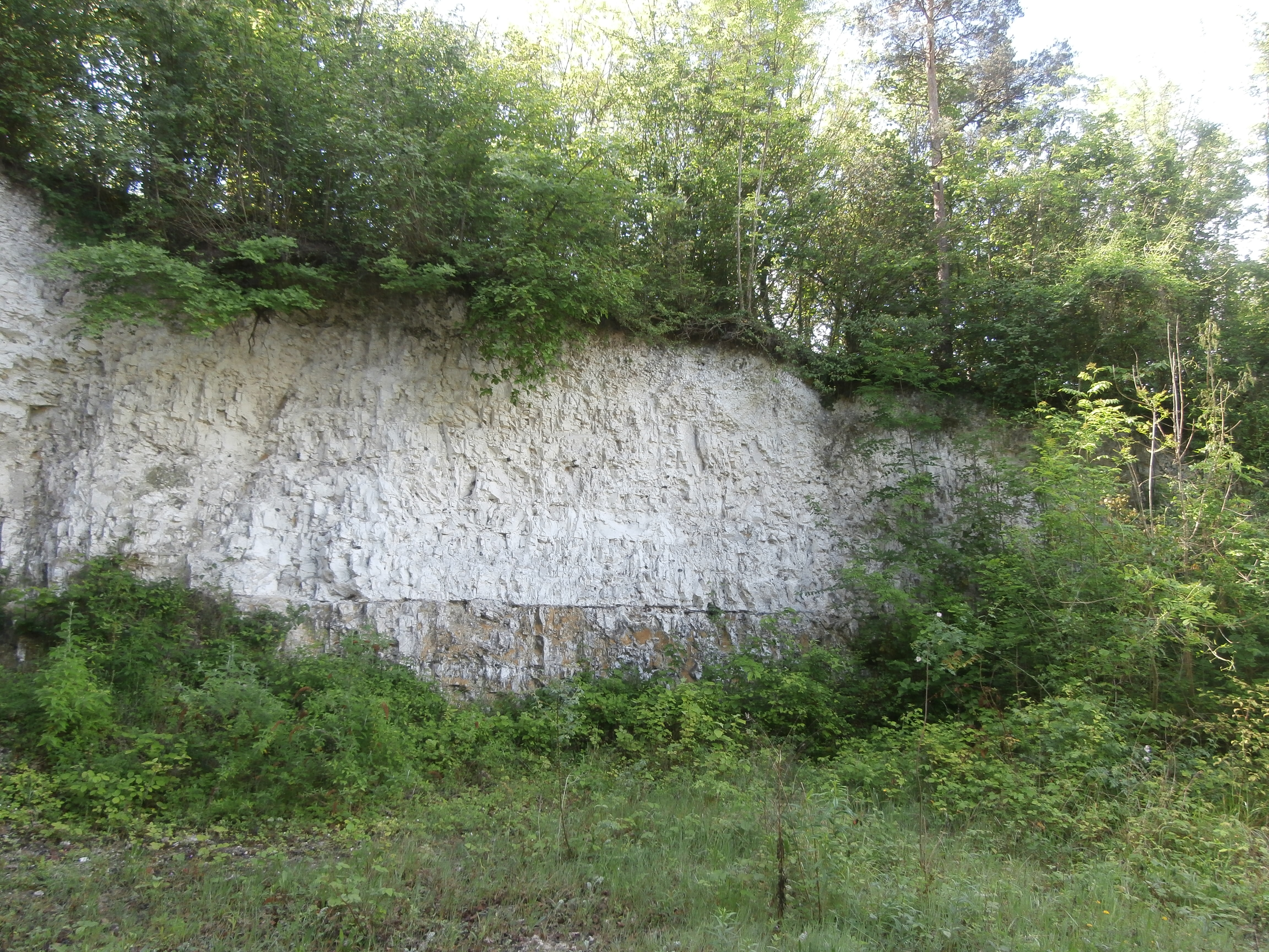 Ancienne carrière de craie à Rémécourt (60), vue générale.